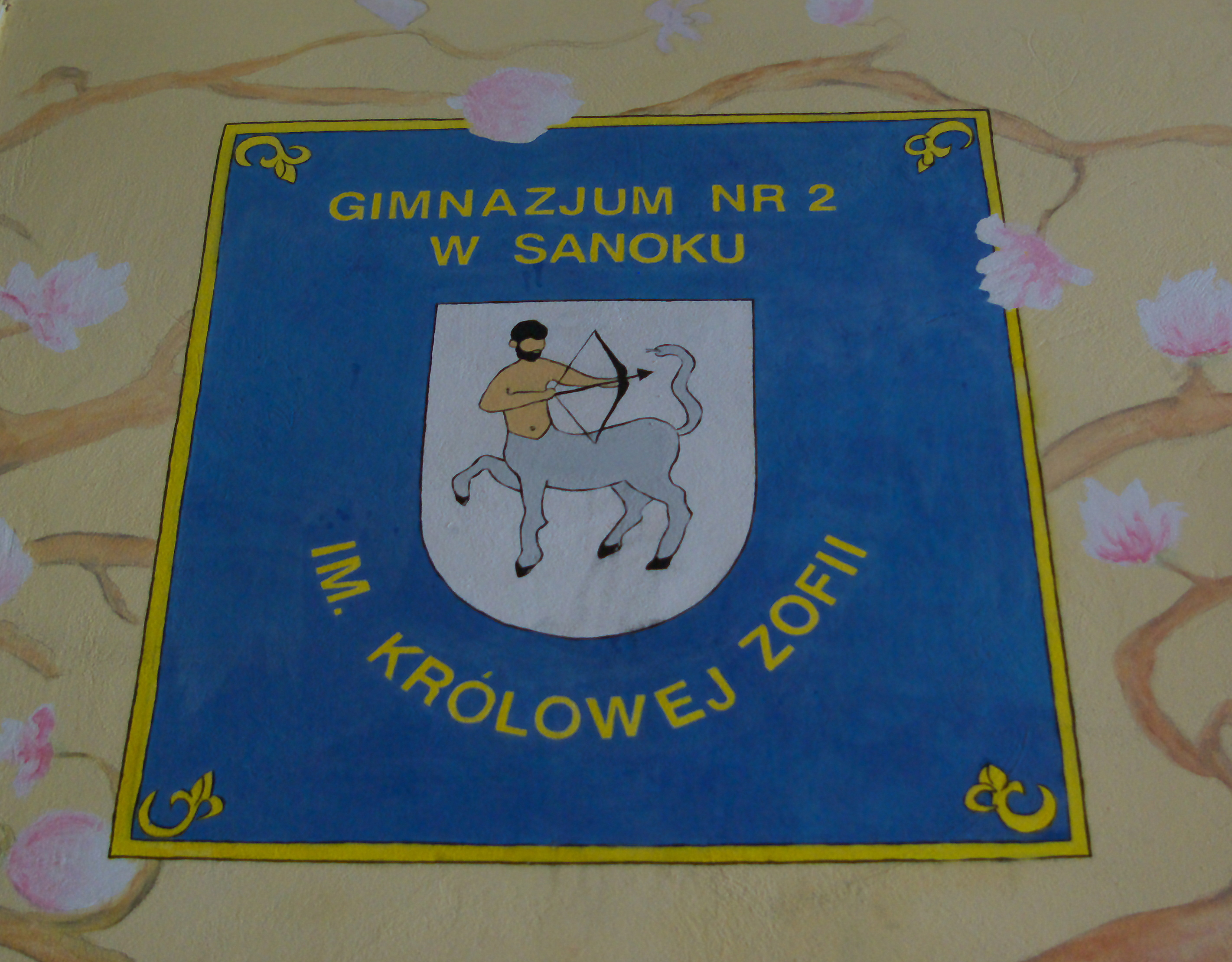 Logo gimnazjum na ścianie w budynku szkoły